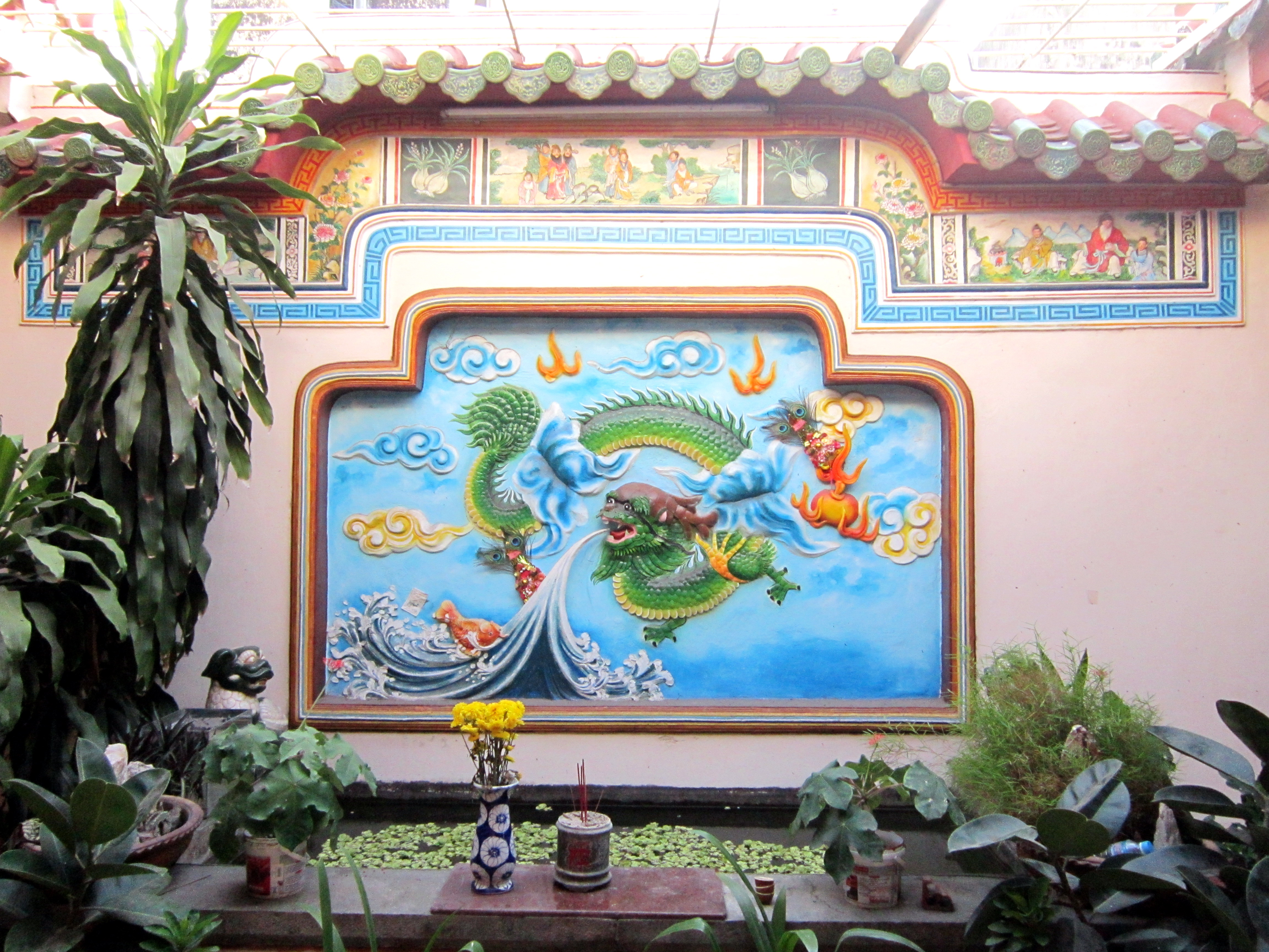 Chùa Bang (Phước Đức cổ miếu), hiện tọa lạc tại số 74 đường Điện Biên Phủ, thuộc phường 3, thành phố Bạc Liêu, tỉnh Bạc Liêu, Việt Nam.